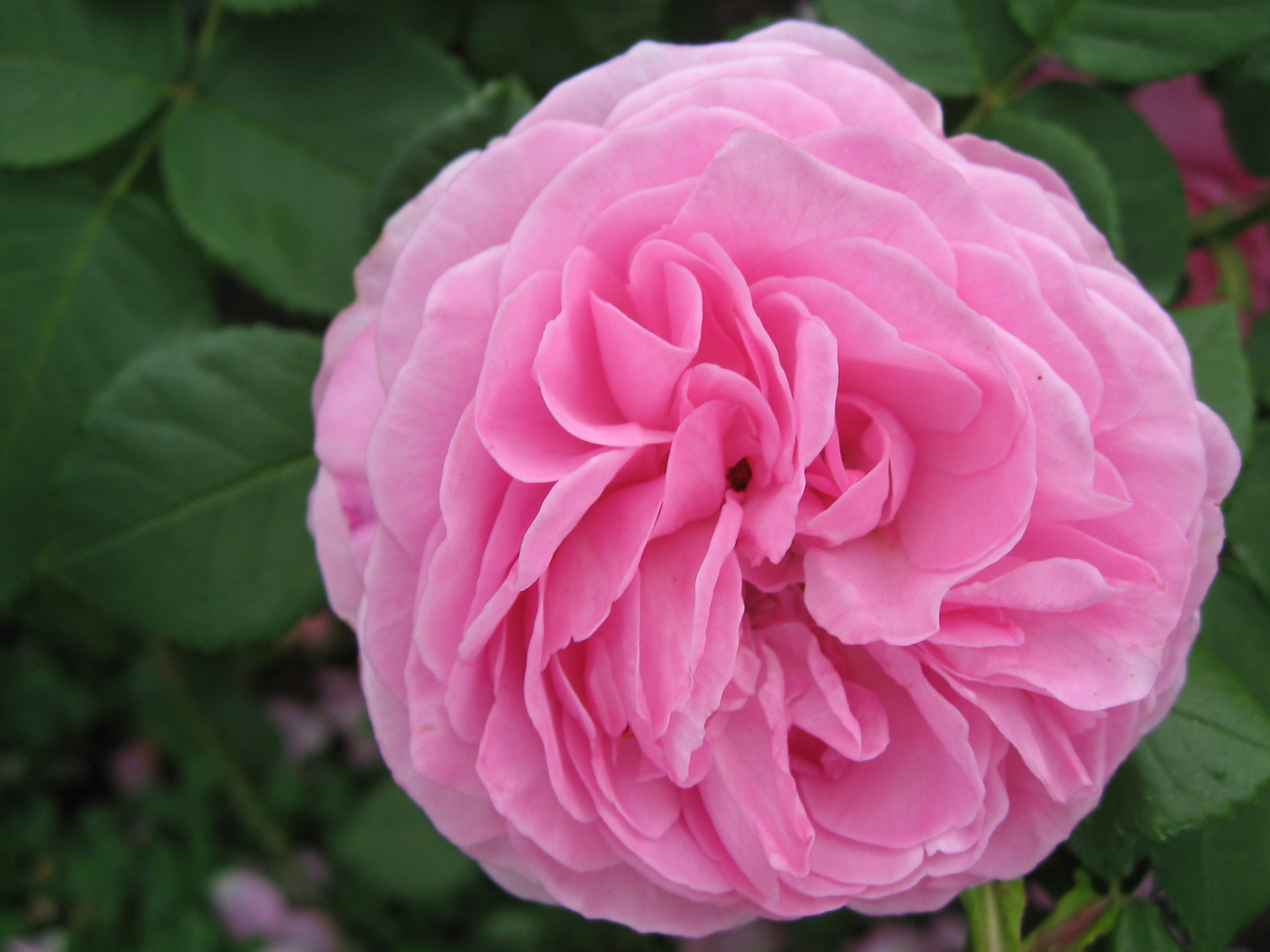 Rosa cv 'Louise Odier', OR(B), Margottin (1851), "Matsusaka Bell-Farm", Isedera Matsusaka Mie, Japan